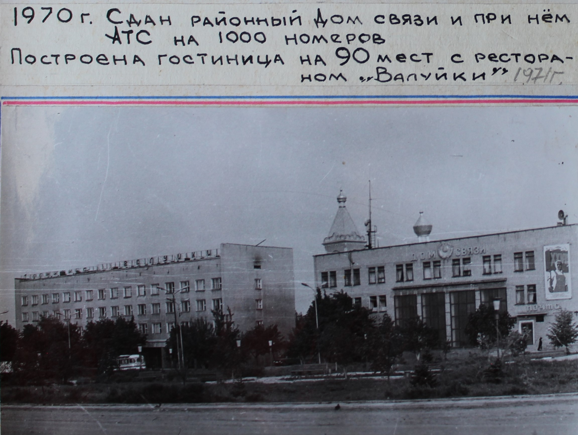 Дом связи в Валуйках, построенный в 1970 году, и при нем АТС на 1000 номеров, а также гостиница на 90 мест. На заднем плане видна Церковь Николая Чудотворца без крестов на куполах.